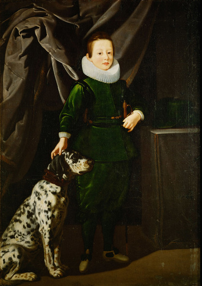 Портрет Франческо Медичи (ок. 1625) кисти Сустермана в Музее истории искусств в Вене